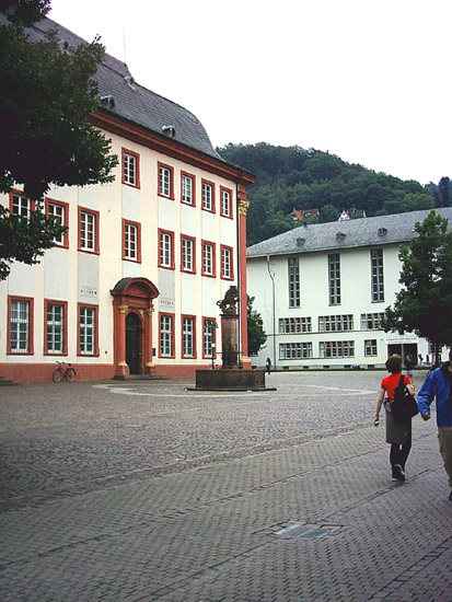 Heidelberg - Universitätsplatz.